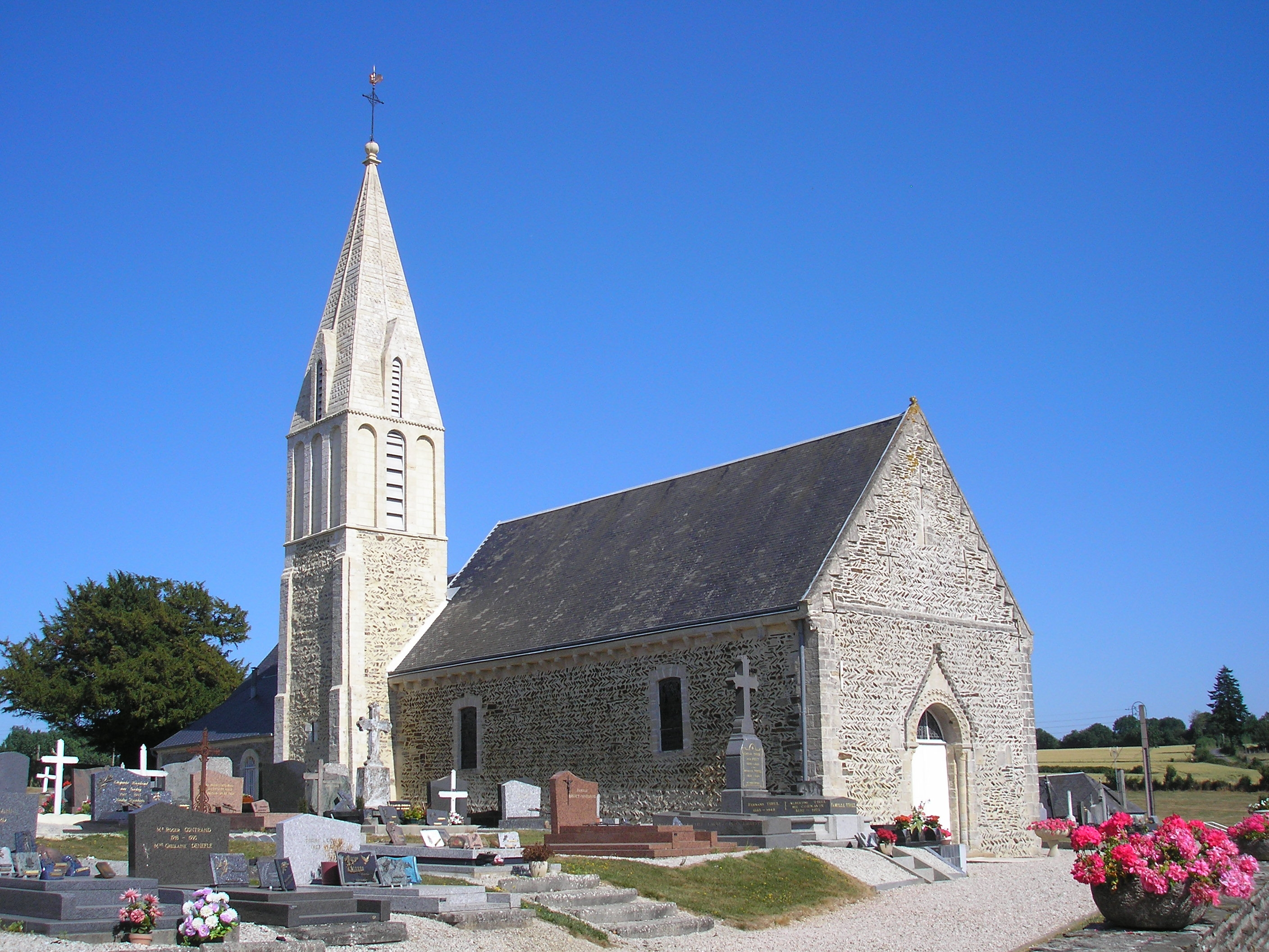 Foulognes (Normandie, France). L'église Saint-Pierre. Elle est appareillée en arête-de-poisson.